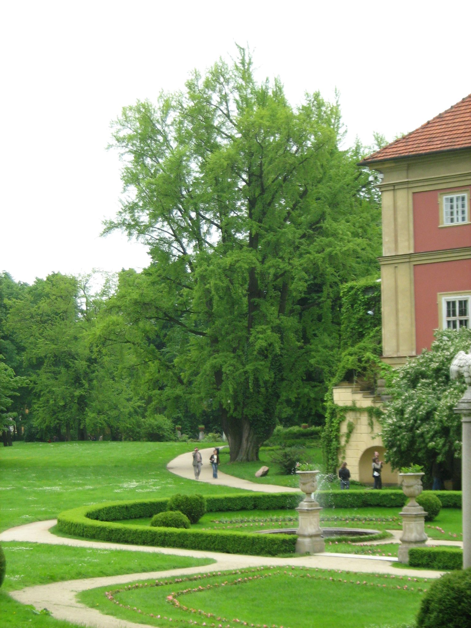 Miłorząb japoński (Ginkgo biloba) w ogrodzie pałacowym w Łańcucie.